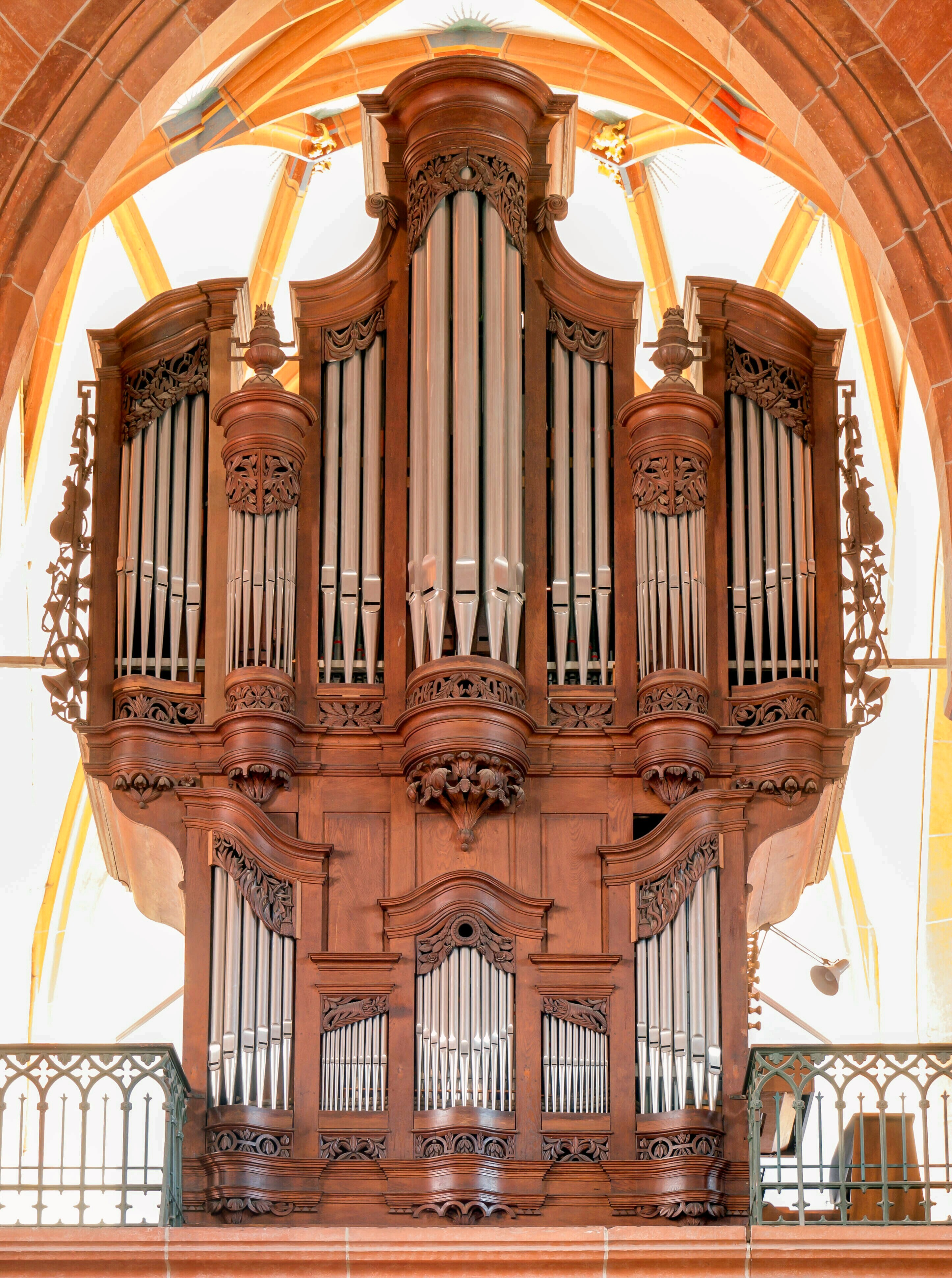 Die Orgel in der Stiftskirche von Sankt Goar wurde zwischen 1818 und 1820 von Franz Heinrich und Carl Stumm aus Sulzbach im Hunsrück gebaut.